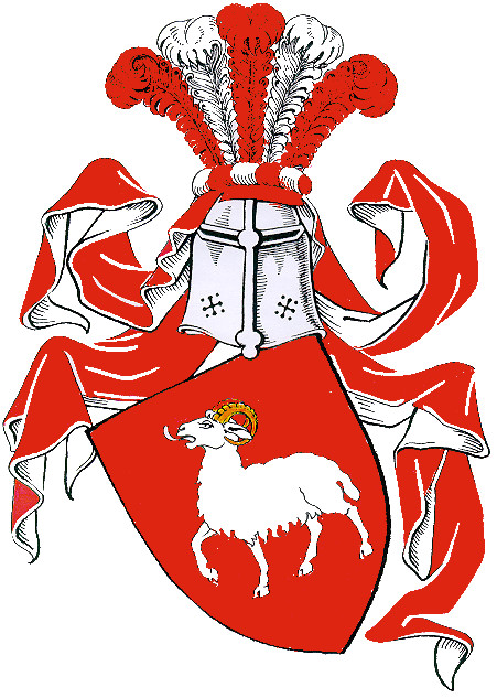 Familienwappen der von Rautenberg-Klinski 1357